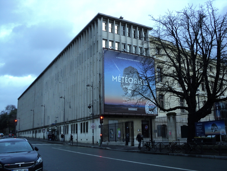 Sur cette photographie, prise en décembre 2017, est visible le bâtiment de la réserve de la bibliothèque centrale du Muséum national d'histoire naturelle. Situé du côté de la rue Geoffroy-Saint-Hilaire à Paris, ce bâtiment a été construit à l'emplacement de l'ancien cabinet d'histoire naturelle du Muséum, dit aussi le cabinet du Roi selon les époques et les régimes politiques.